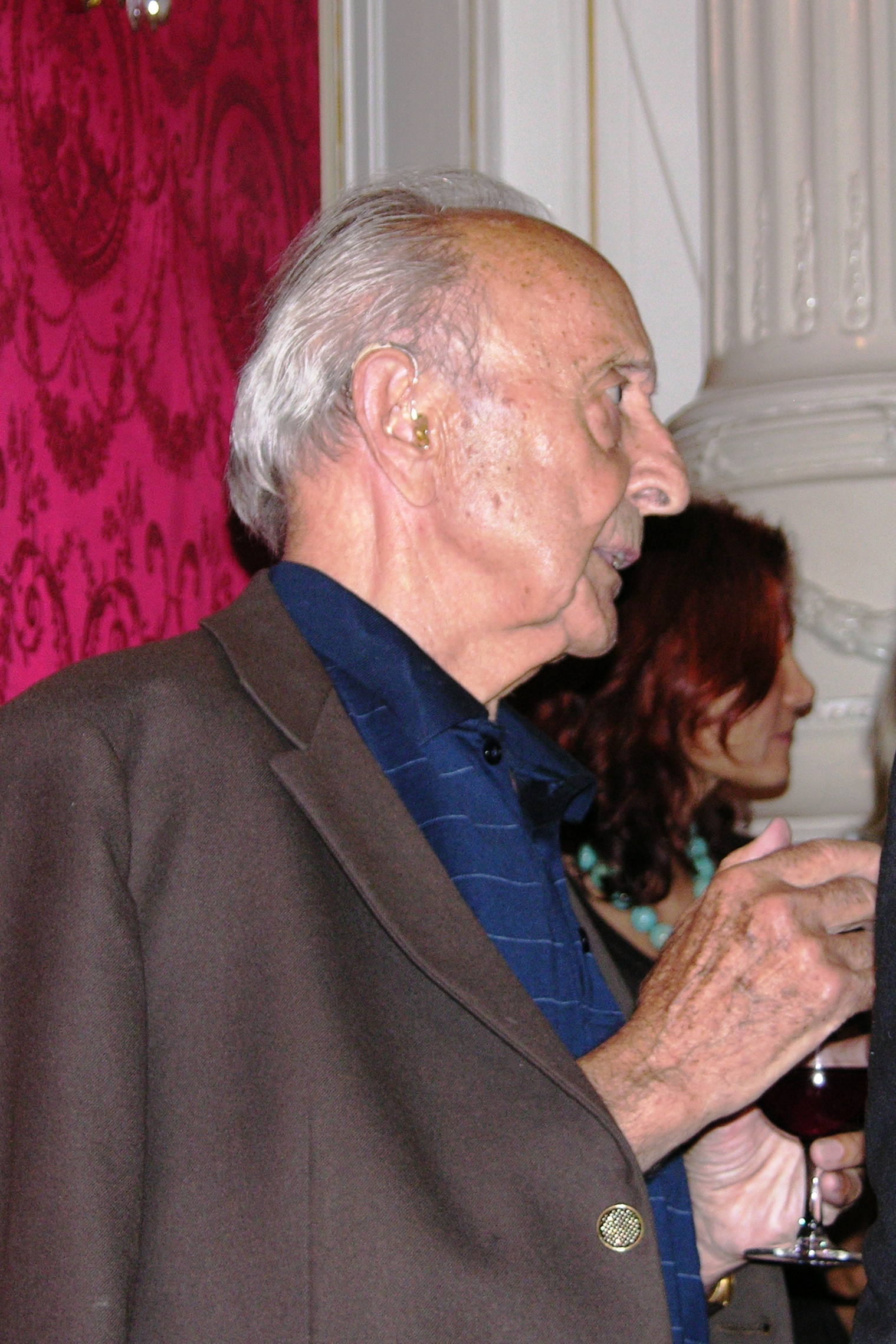 Franz Wegart am 19. Juni 2008